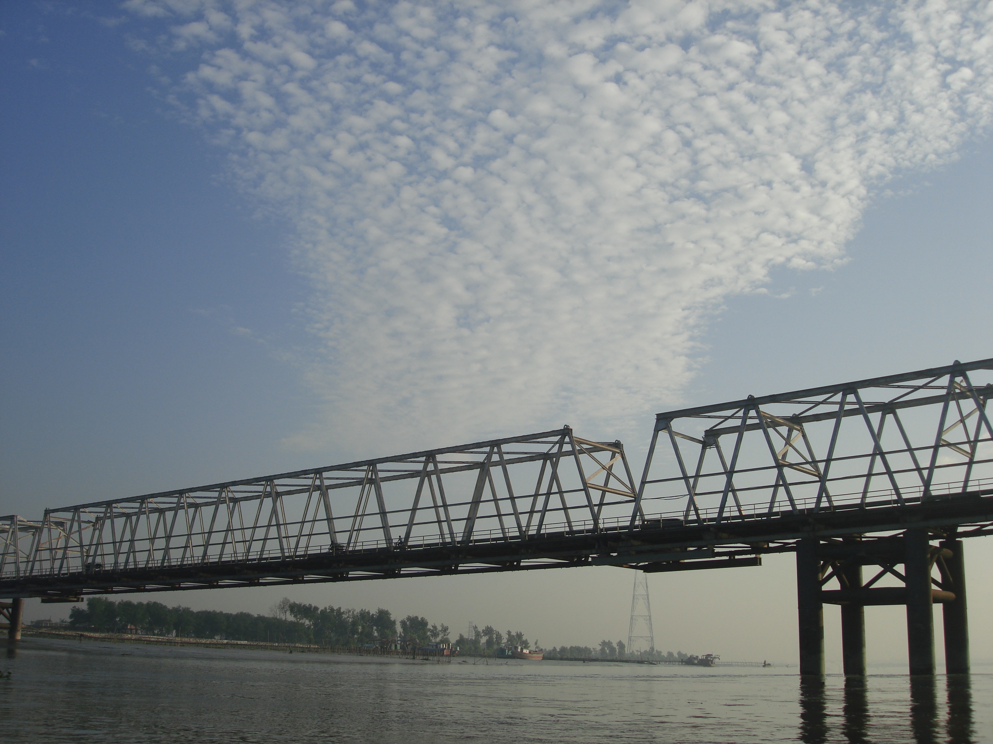 Old Karnaphuli bridge